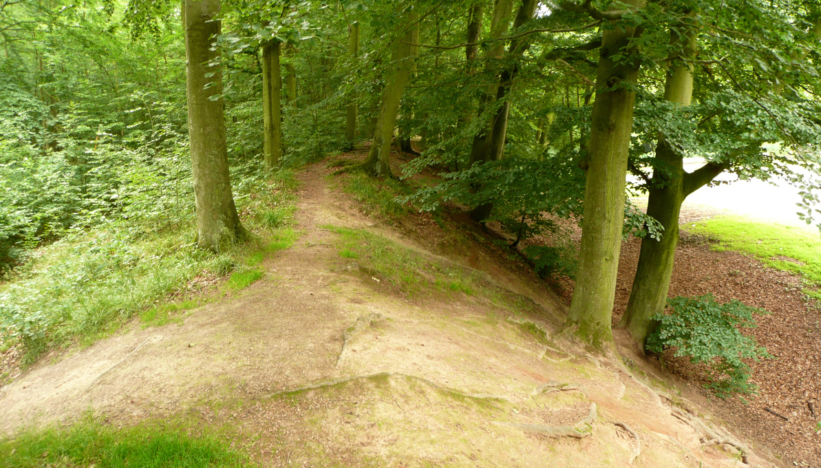 Ringwall der Marienburg